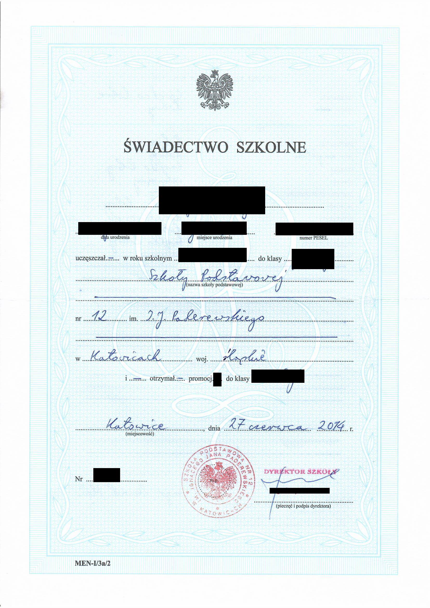 Strona pierwsza świadectwa Szkoły Podstawowej nr 12 im. Ignacego Jana Paderewskiego w Katowicach